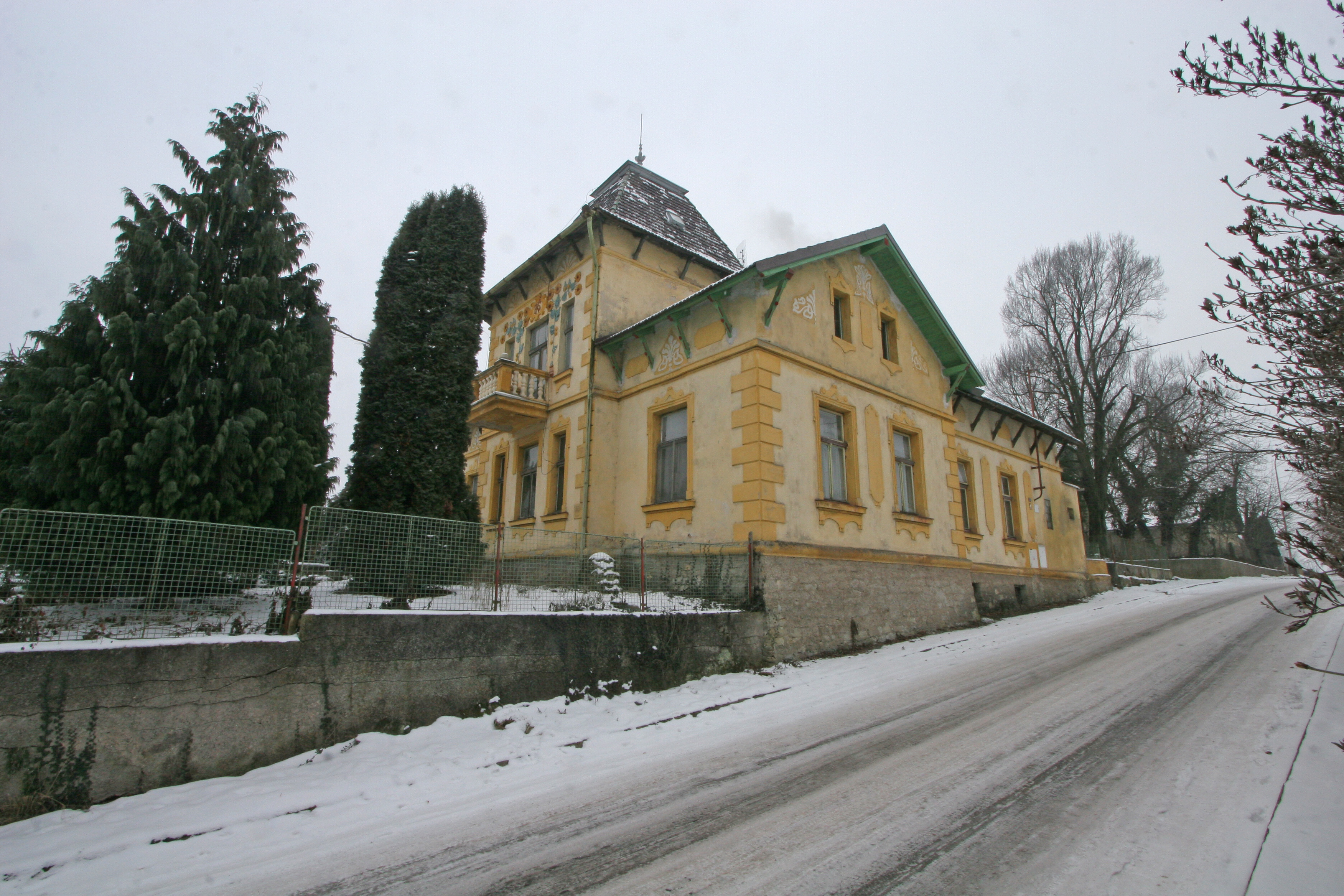 Opočno čp 1